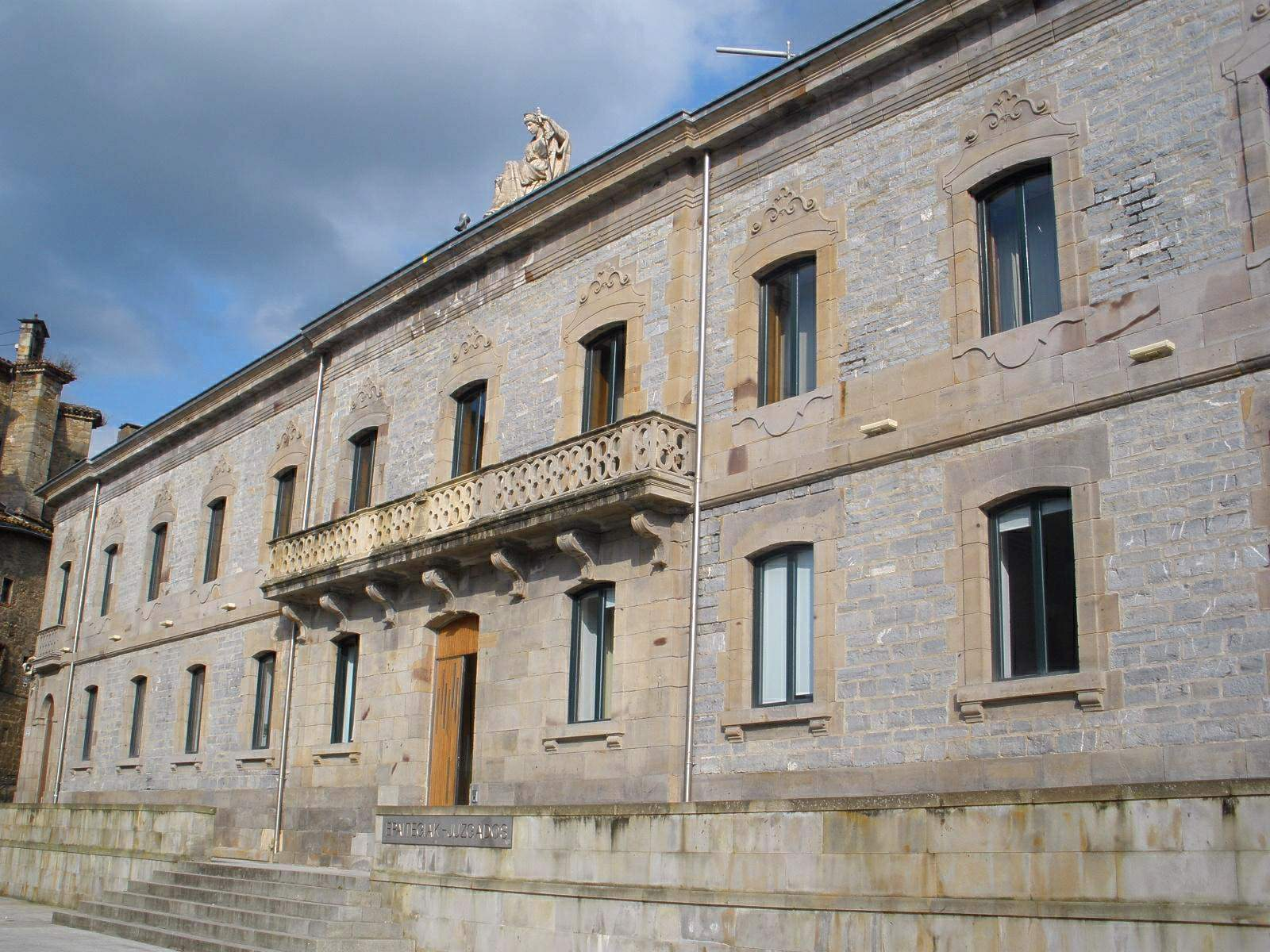 Juzgados de Bergara (Gipuzkoa)